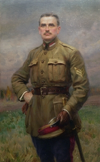 "Płk Bolesław Mościcki"